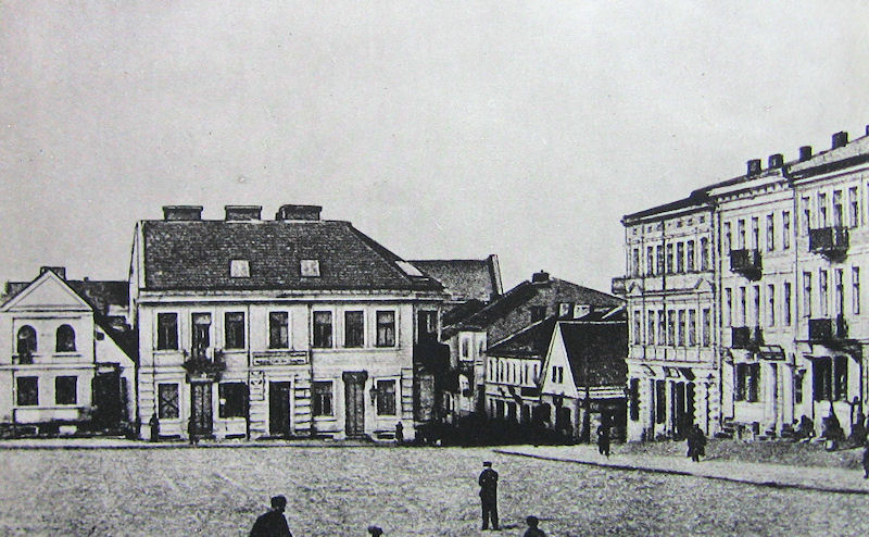 Stary Rynek w Łomży z 1912 roku (w głębi ulica Rządowa)